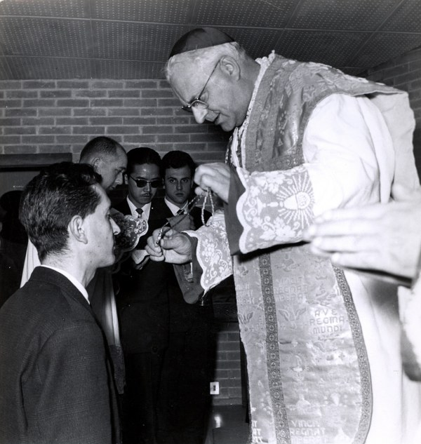 Card. Urbani consegna il crocifisso al dott. Giannino Lay - 1964